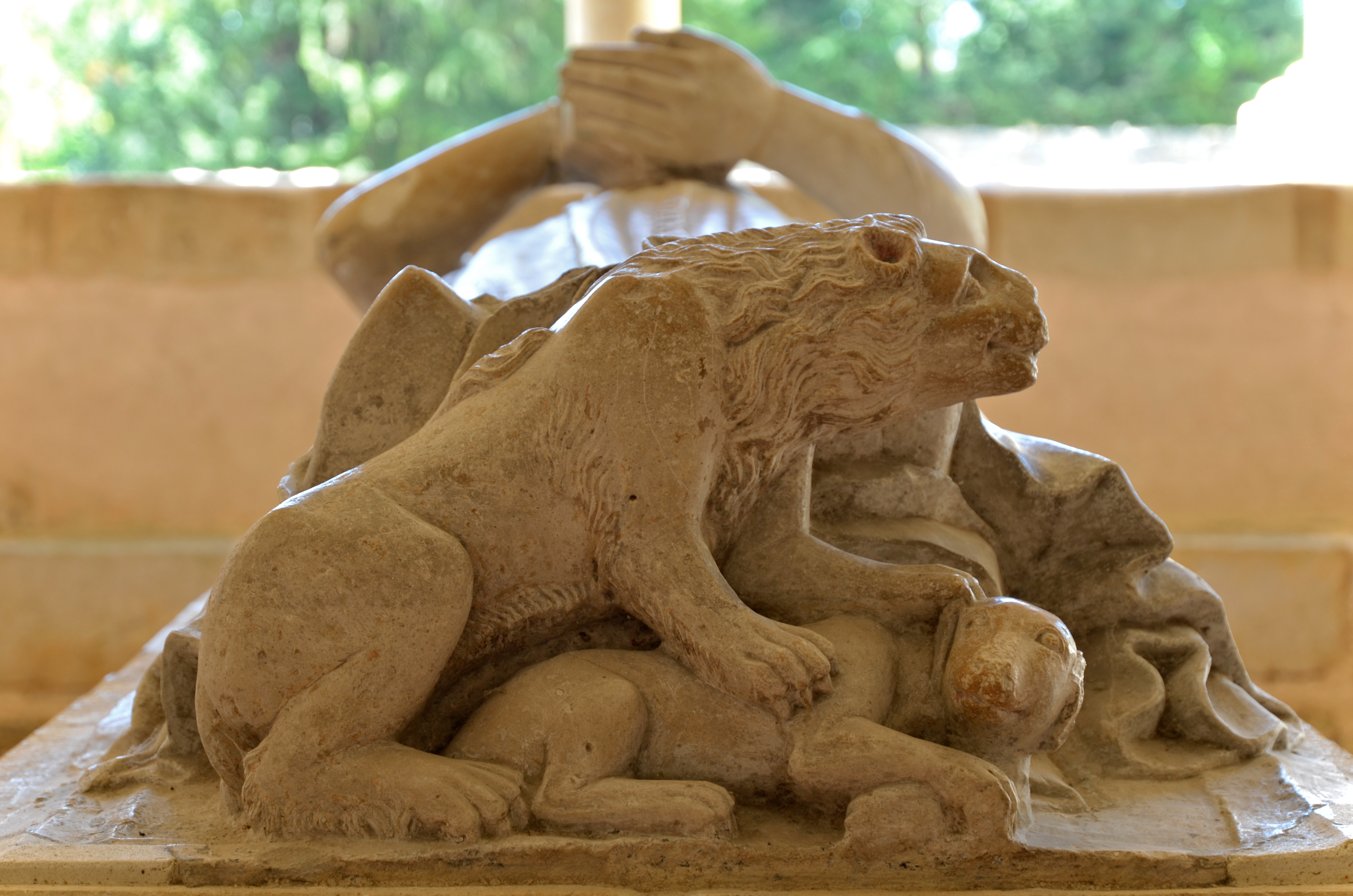 La Reine Bérengère de Navarre - Abbaye de l'Épau - Yvré-l'Évêque, Sarthe .